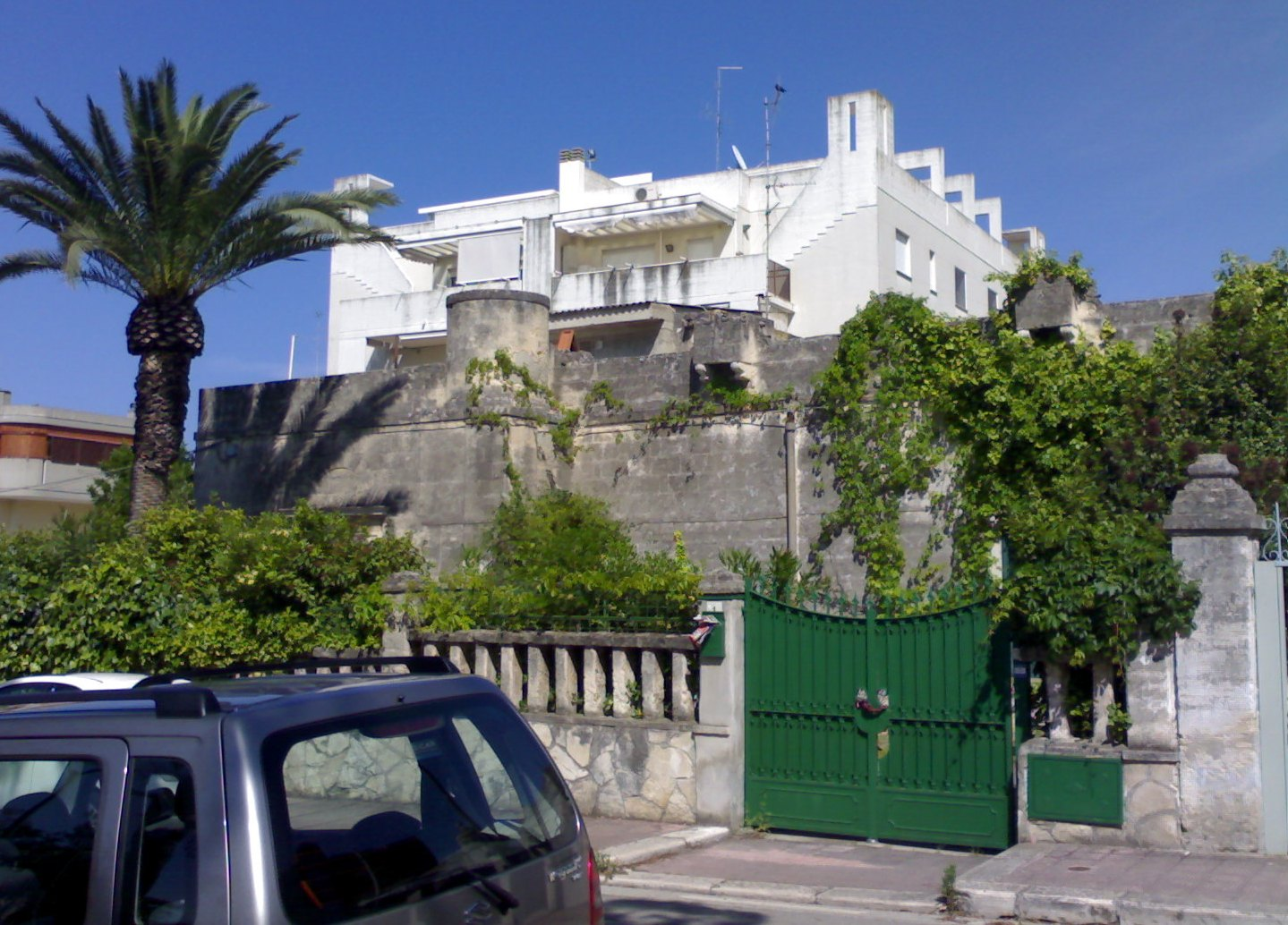 Parte sinistra della villa Amari Cusa, sita nel quartiere Palese di Bari.